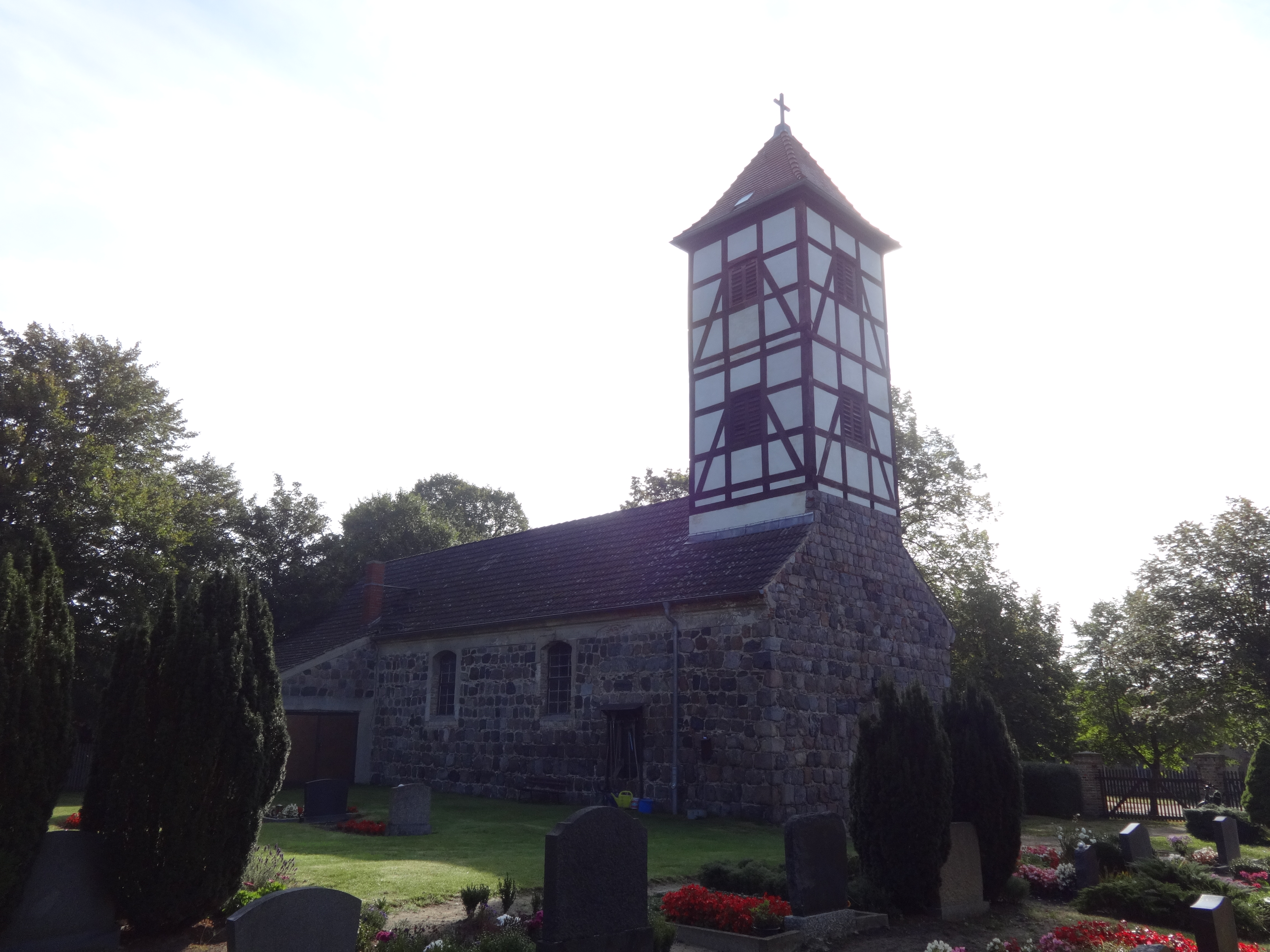 Die Dorfkirche in Schenkenhorst ist eine Feldsteinkirche aus dem Ende des 13. Jahrhundert. Sie wurde vermutlich im 16. Jahrhundert nach Osten hin verlängert. Vor der südlichen Wand des Kirchenschiffs ist eine Urnengrabstätte der Familie von Treplin. Der Innenraum ist von einer Renovierung in den Jahren 1911 und 1912 geprägt.